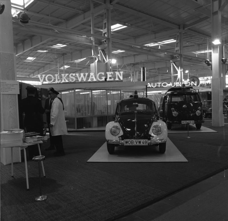 Internationale Polizei-Ausstellung Hannover 1966 VW